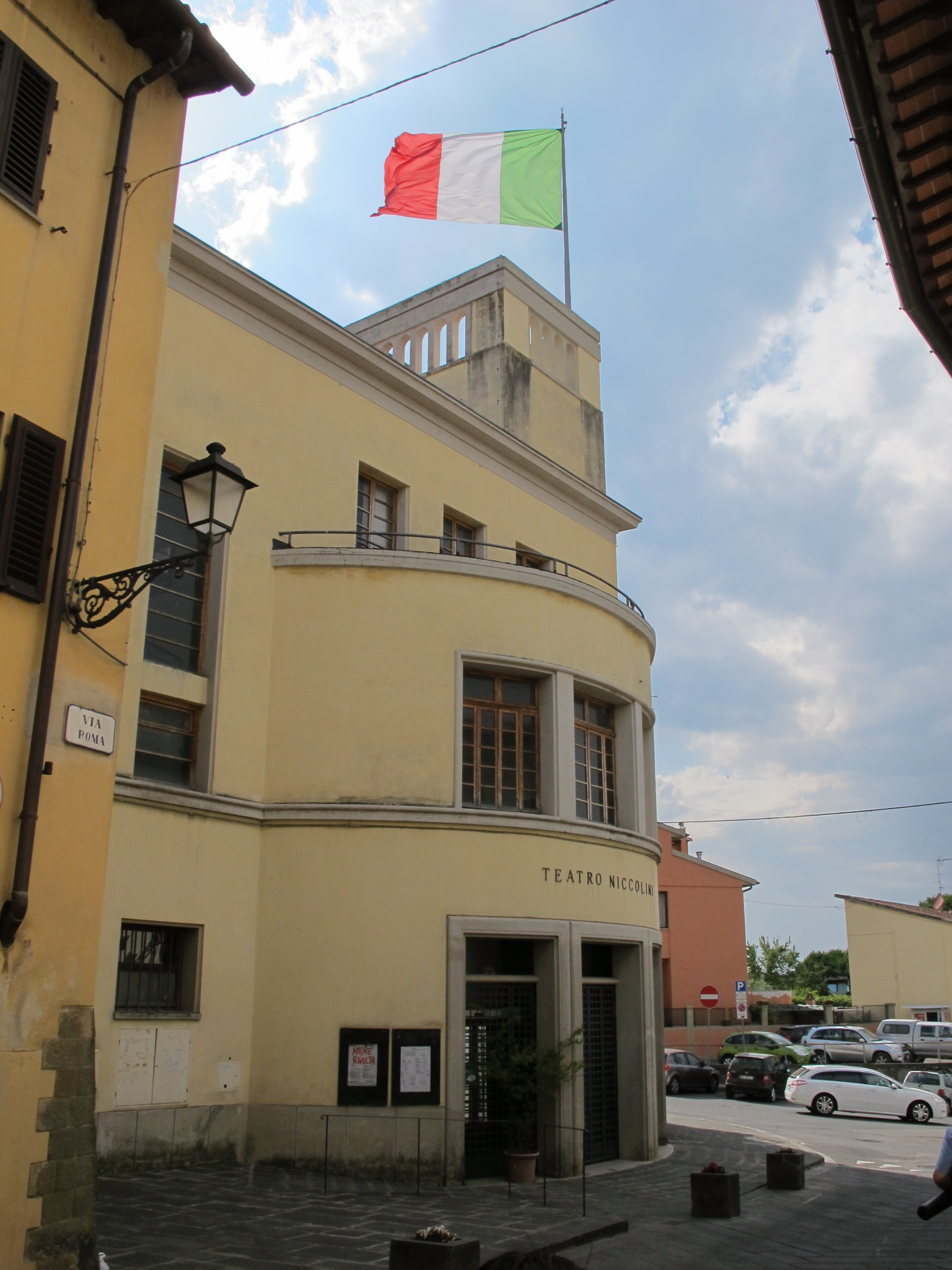 San casciano, teatro niccolini